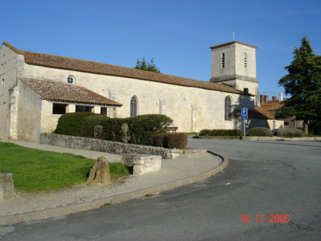 Église Saint-Pierre du Langon(85).